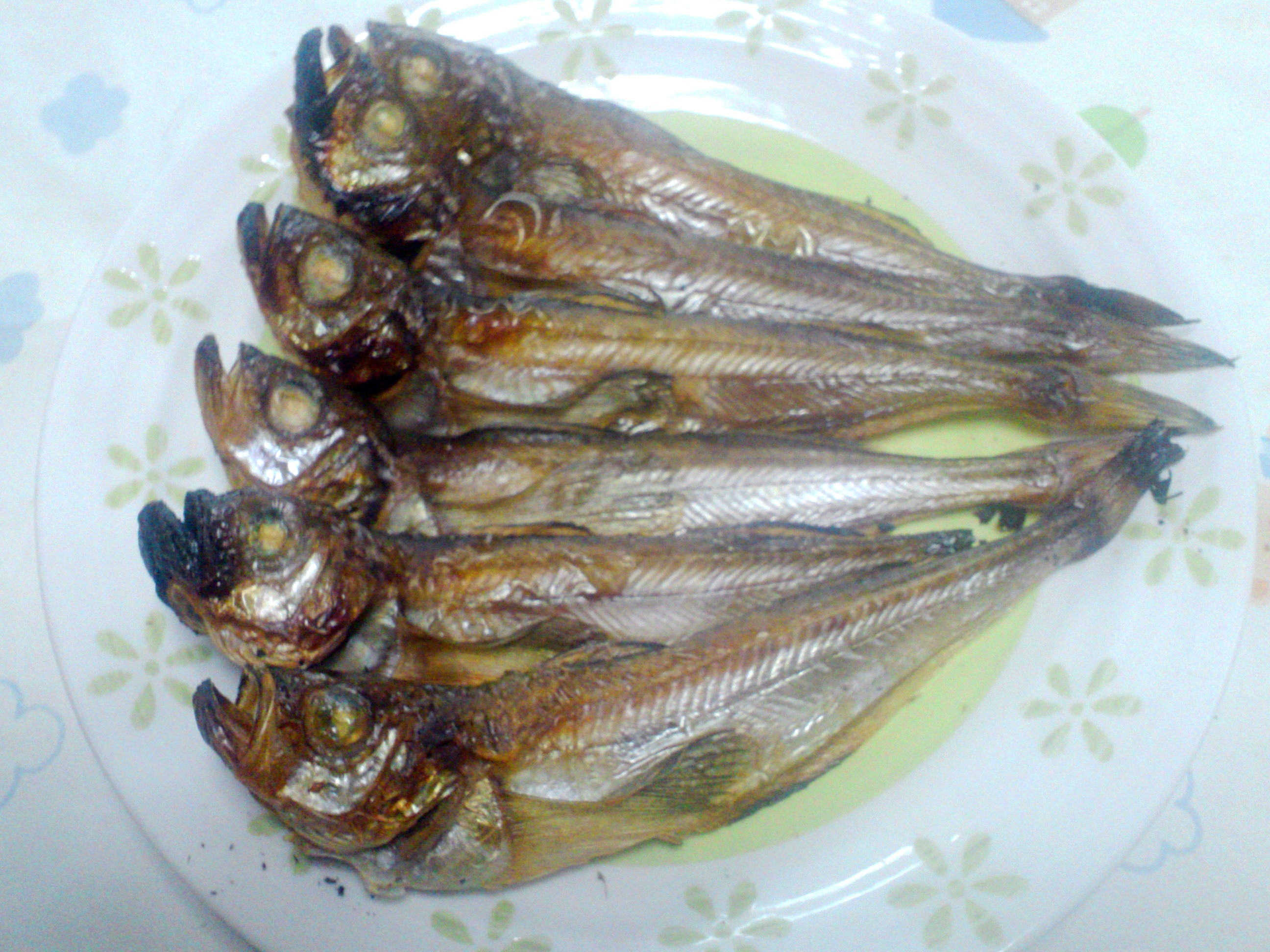 ハタハタ (Arctoscopus japonicus) の干物。